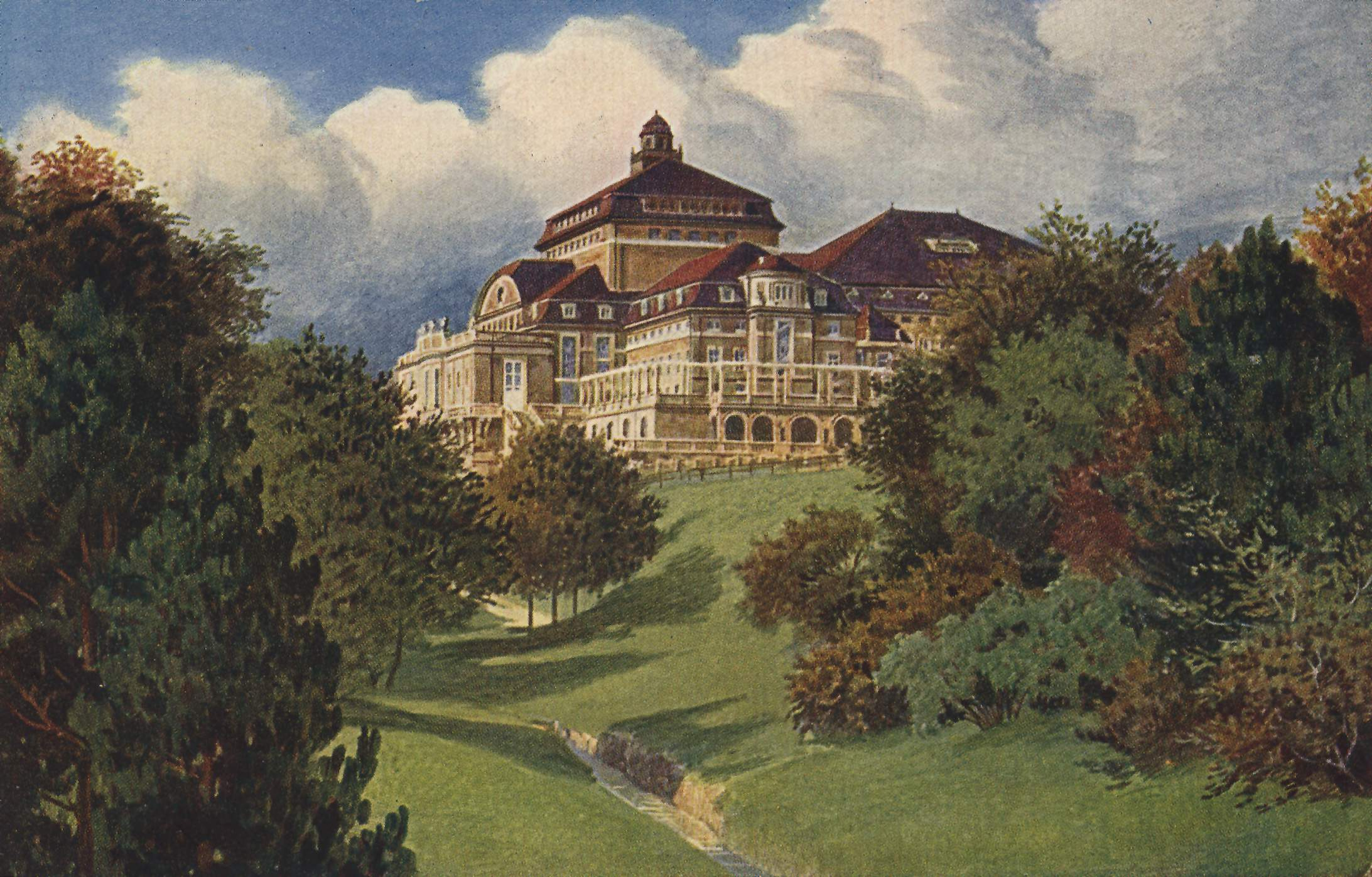 Hoftheater in Kassel, Postkarte von ca. 1910. Das Hoftheater wurde auf Anweisung des Kaisers Wilhelm II. im Jahre 1909 im historistischen Stil errichtet. Im 2. Weltkrieg beschädigt, wurde es abgerissen und 1959 durch den modernistischen Neubau des Staatstheater Kassel ersetzt.